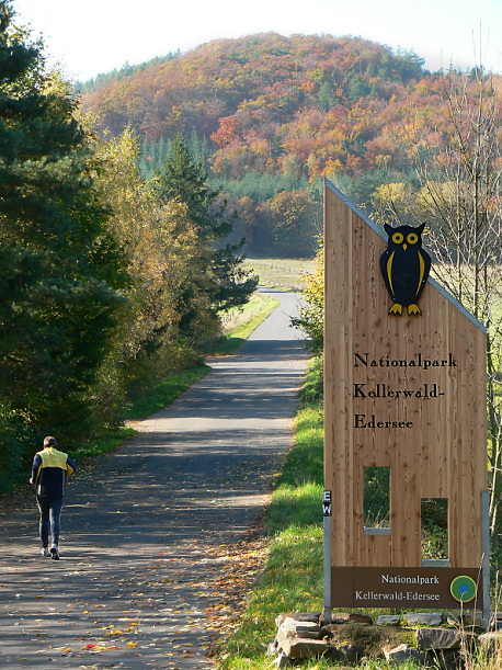 Schild Nationalpark Kellerwald Edersee